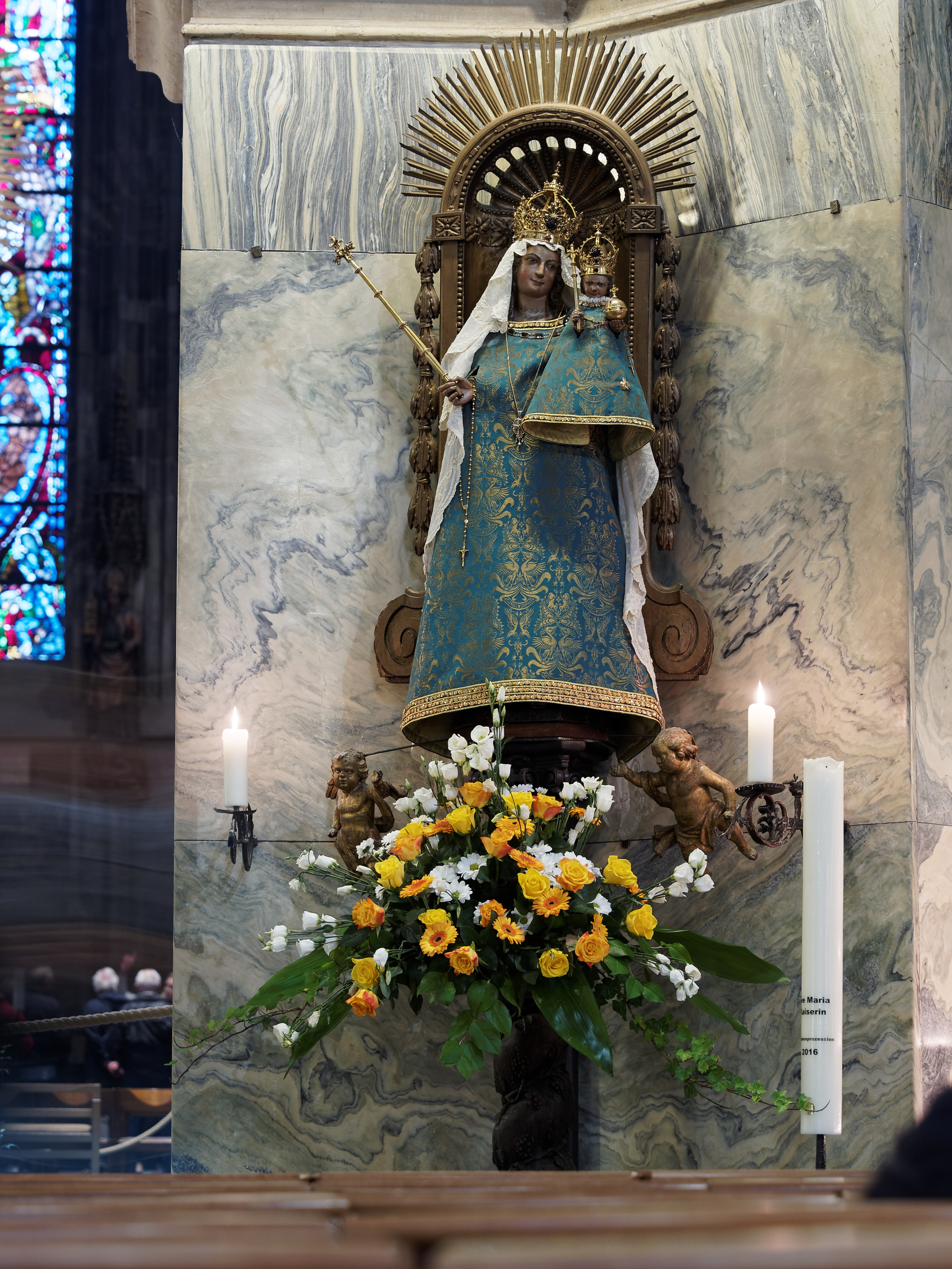 Aachener Dom, Gnadenbild südlich naben dem Altar.